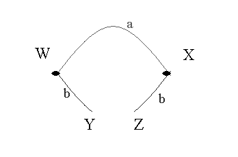 Circuit thermoélectrique de base. dessin réalisé par Utilisateur:David Berardan Utilisateur:David Berardan